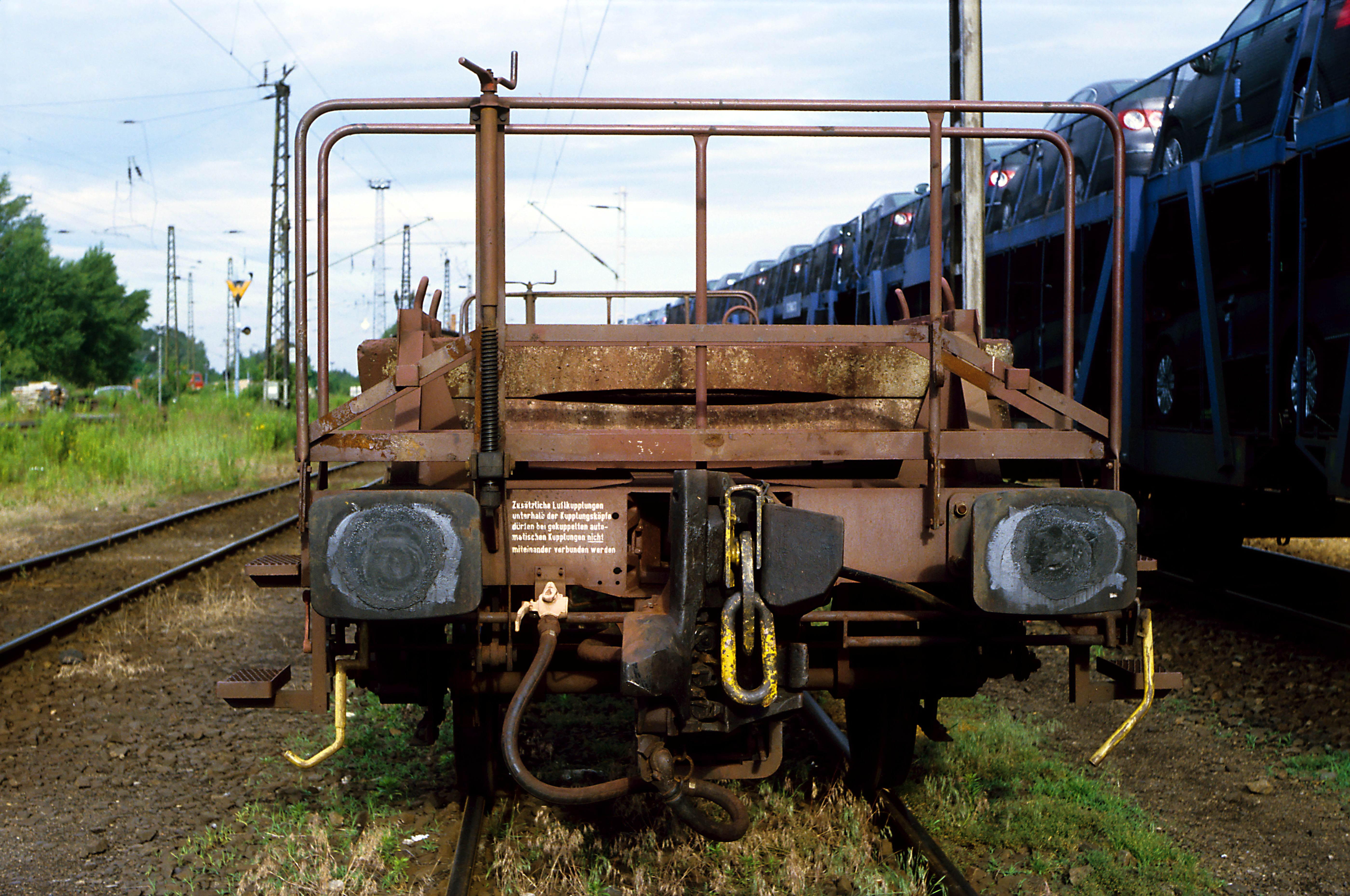 mit eingesetzter Gemischtkupplung; der Luftschlauch ist wegen des großen Kuppelkopfes verlängert und an diesem zusätzlich gestützt und aufgehängt. Die Anschrift am Lufthahn weißt Rangierer nochmals darauf hin, dass die Schlauchkupplung bei vorhandenener und funktionsfähiger Leitungskupplung an beiden Wagen mit Mittelpufferkupplung nicht zu verbinden ist.